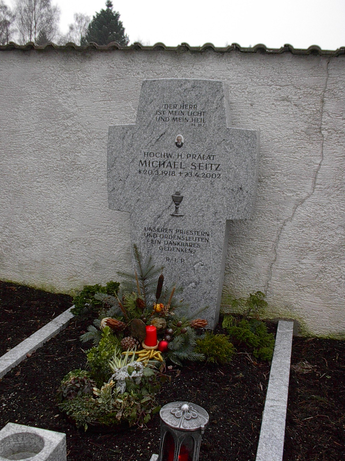 Das Grab von Prälat Michael Seitz in Joshofen.